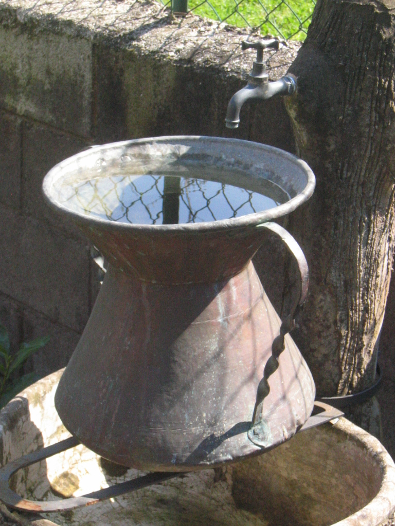 here